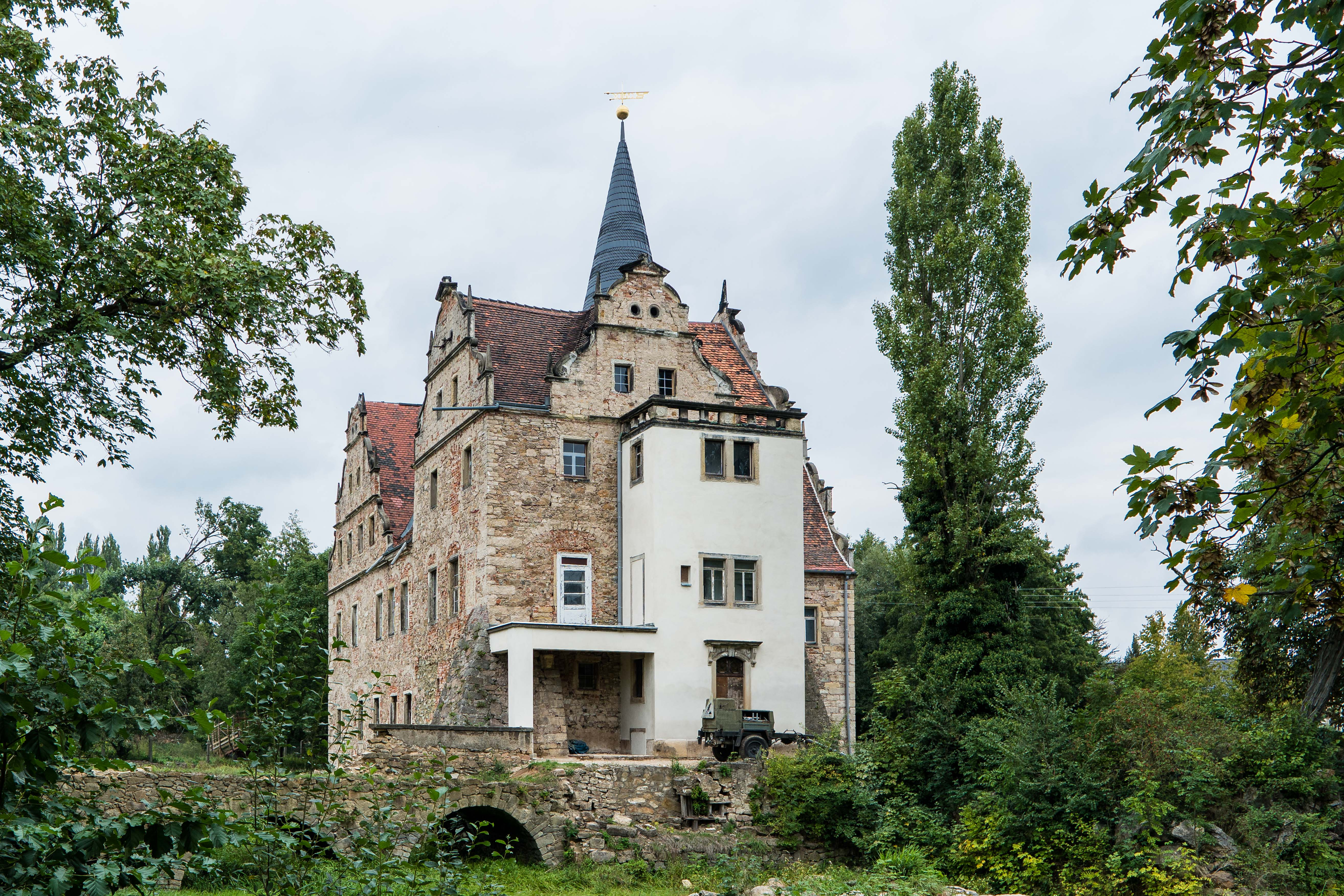 Wasserschloss Oberau